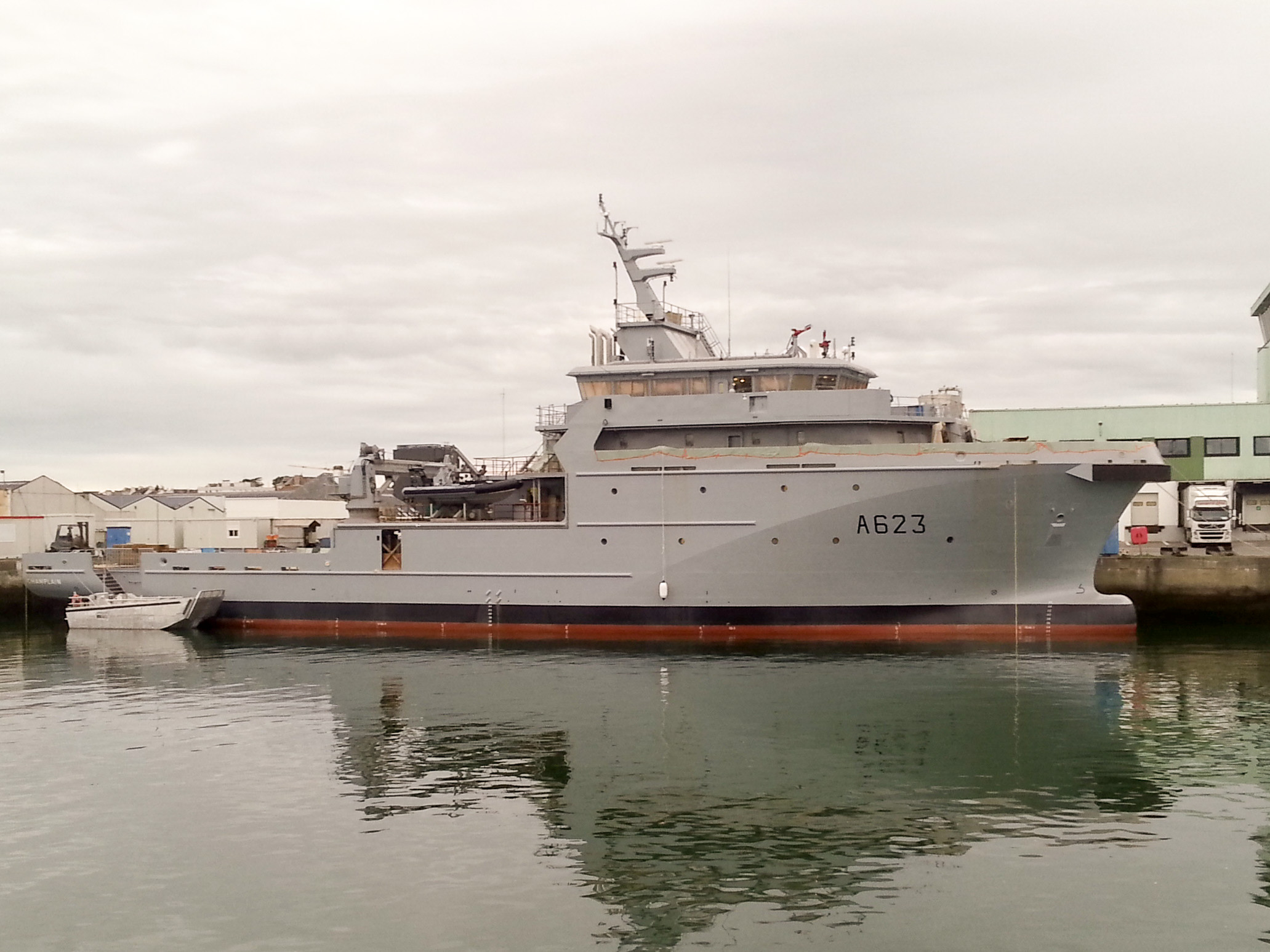 Le Champlain (A623) à quai à Concarneau en septembre 2016.